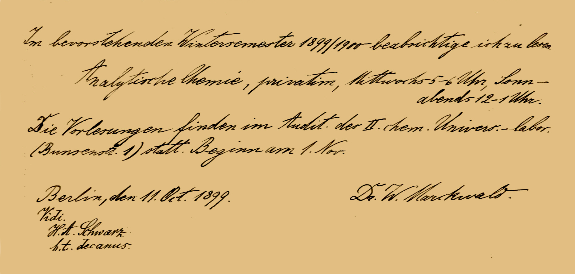 Vorlesungsankündigung Dr. Willy Marckwald für II. Chem. Institut, Bunsenstr. 1, Berlin